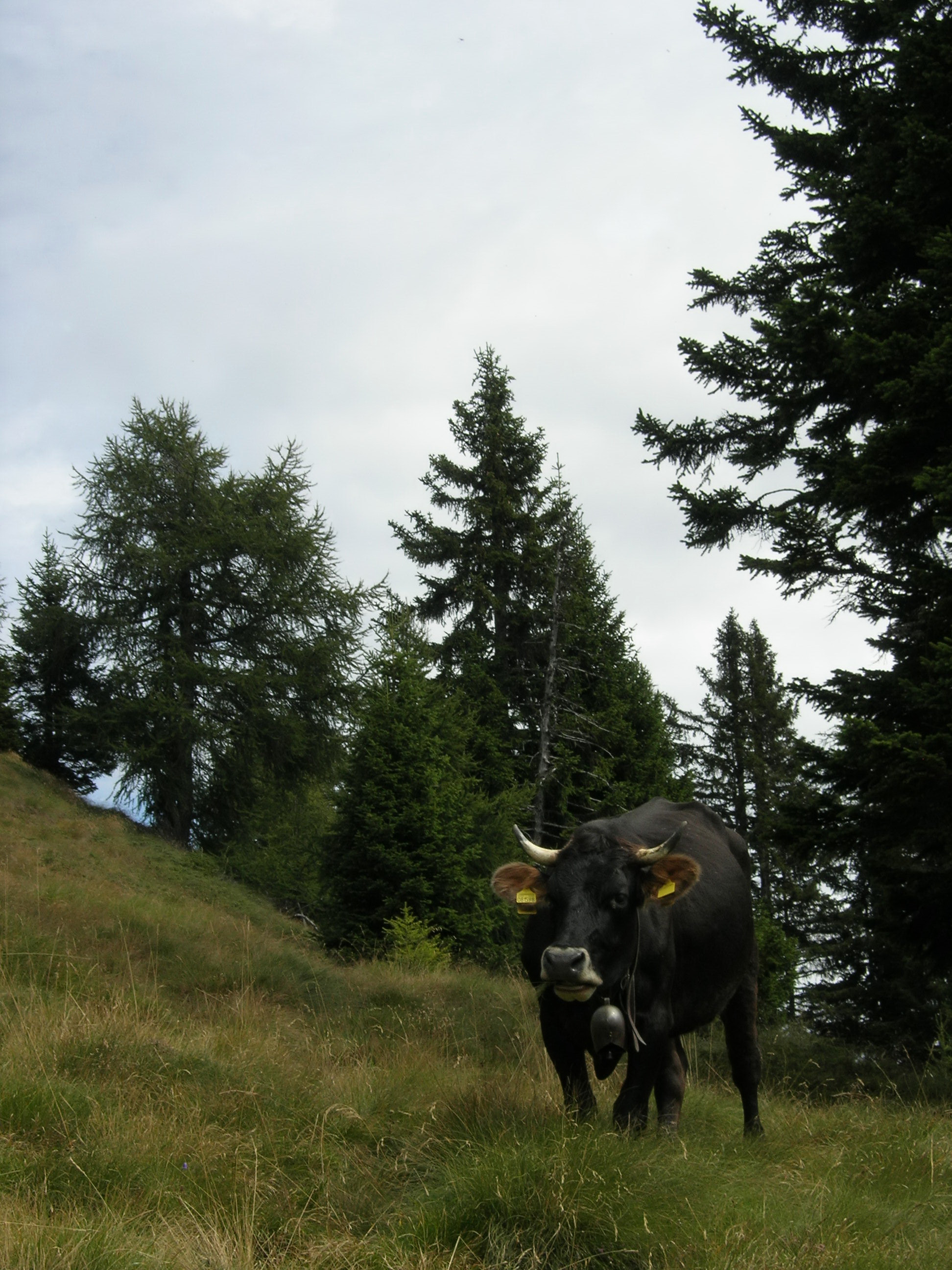 Rendena al pascolo